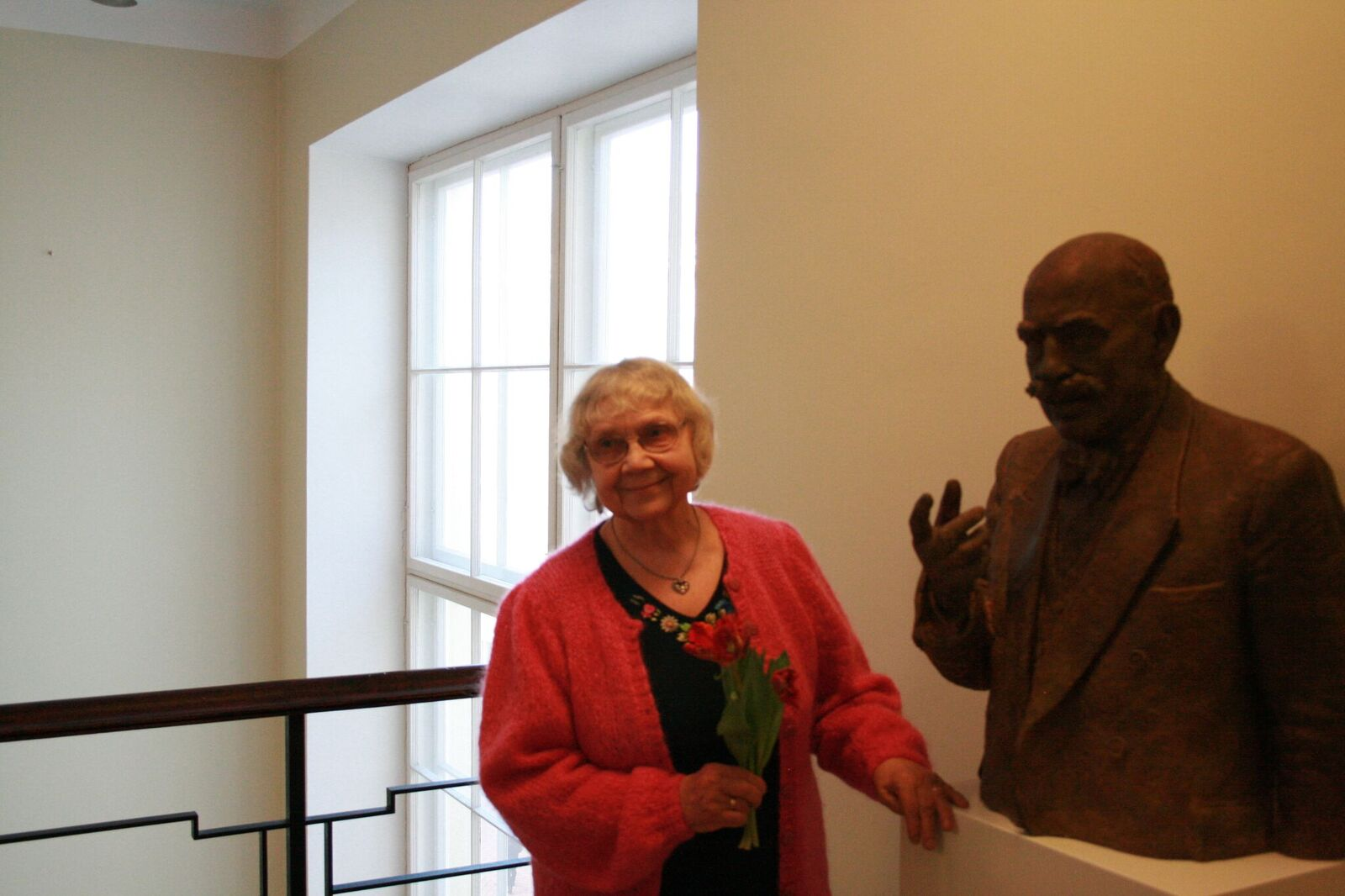 Valve-Liivi Kingisepp akadeemik Veski portreebüsti avamisel Jakobi 2, Tartu